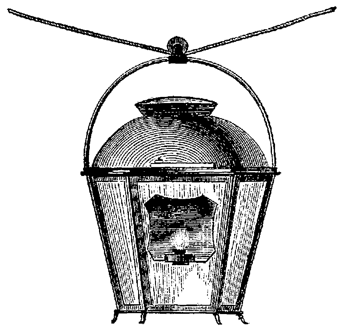 Le premier réverbère